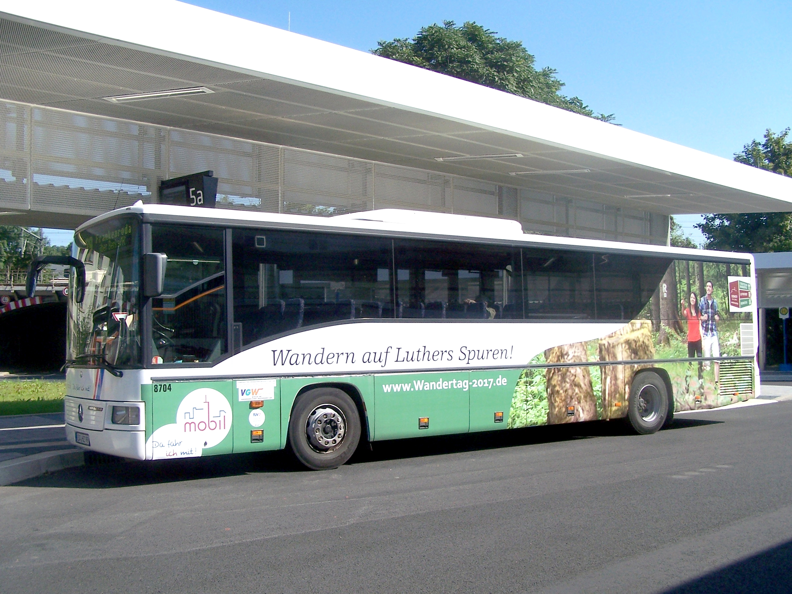 Ein Wanderbus der Verkehrsgesellschaft Wartburgkreis auf dem Eisenacher ZOB.